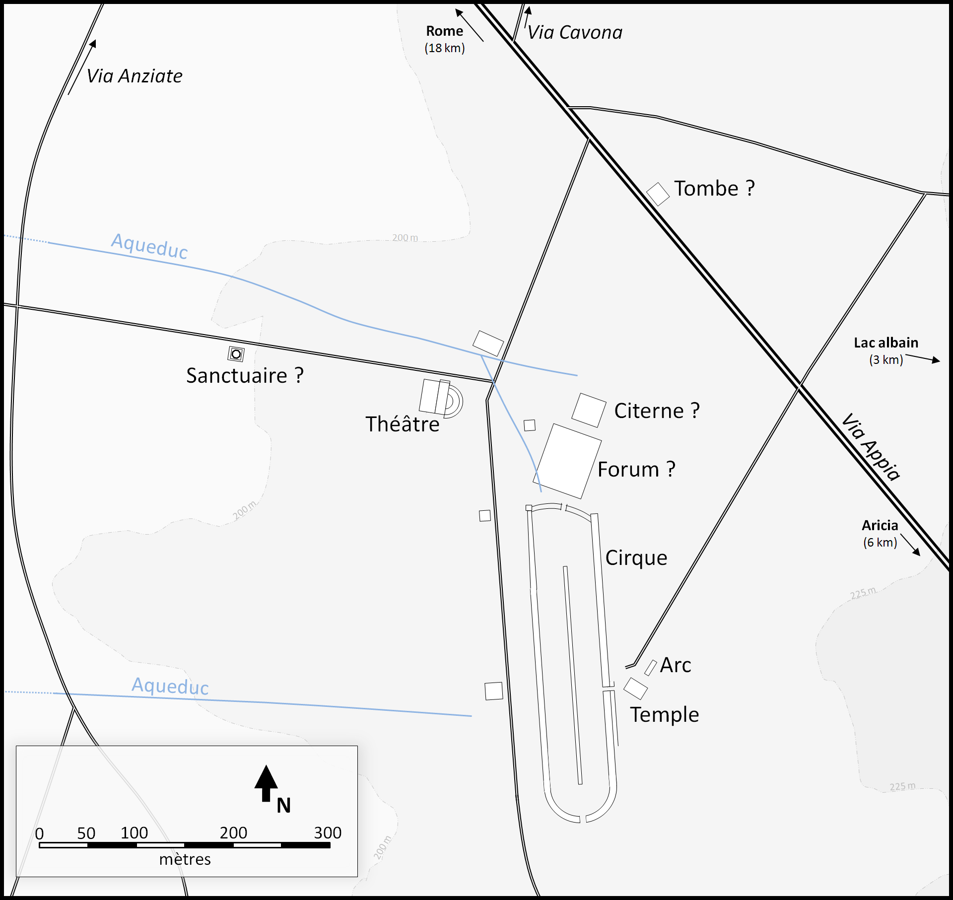 Plan de Bovillae, à partir des résultats des fouilles de 1823-1825 : - L. Poletti, Archaeological map of Bovillae (Tambroni 1823) - G.M. De Rossi, Archaeological map of Bovillae (De Rossi 1979) - Canina 1849-1853